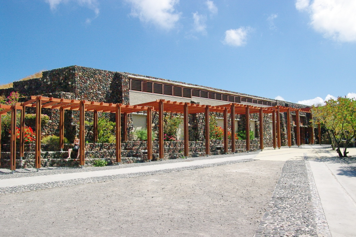 Halle der Ausgrabungen von Akrotiri